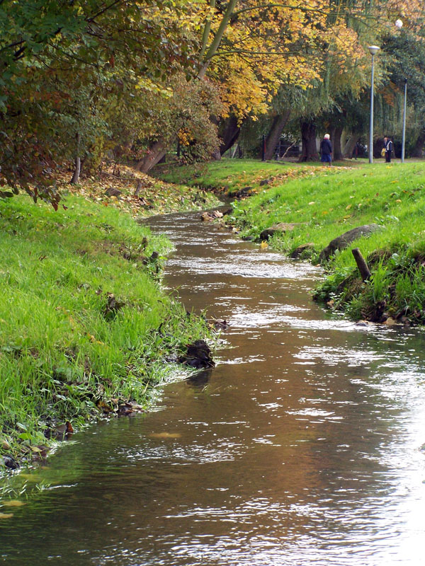 Struga Goleniowska - Planty